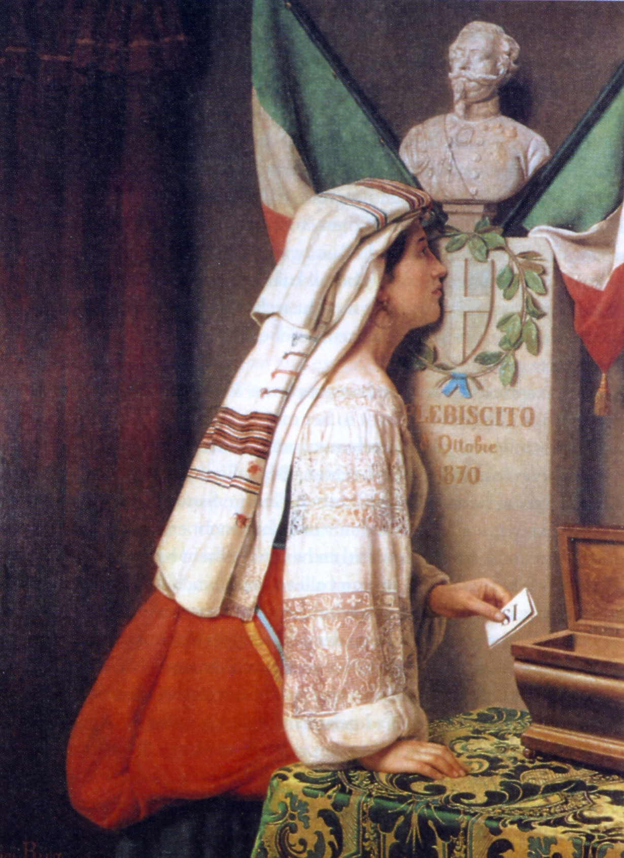 Plebisciet in Rome, 8 oktober 1870, schilderij Luigi Riva